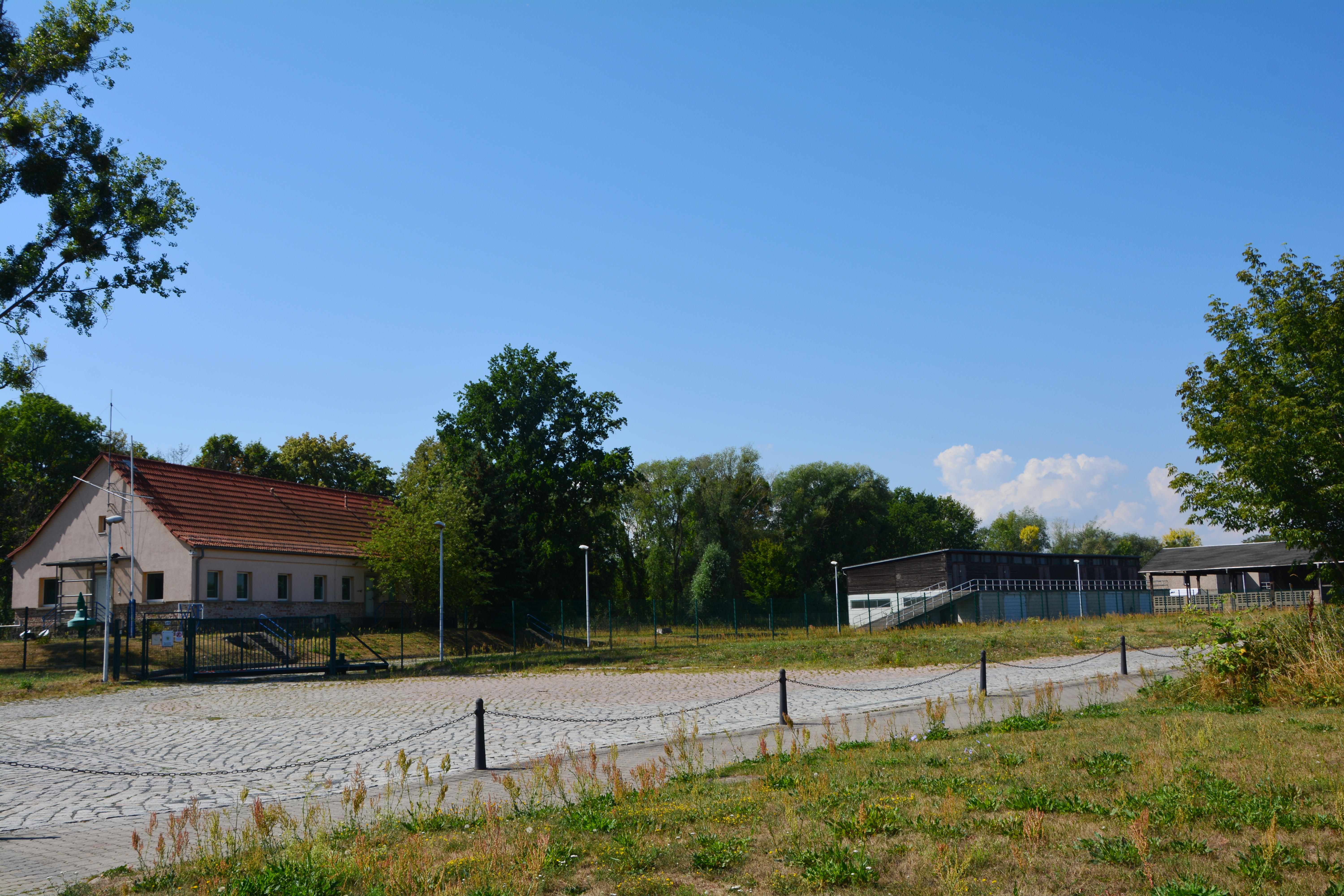 Pirna: Wasserplatz der Nationale Volksarmee der DDR von 1958 bis 1990. Von 1928 bis 1945 militärische Nutzung u.a. von der Wehrmacht.